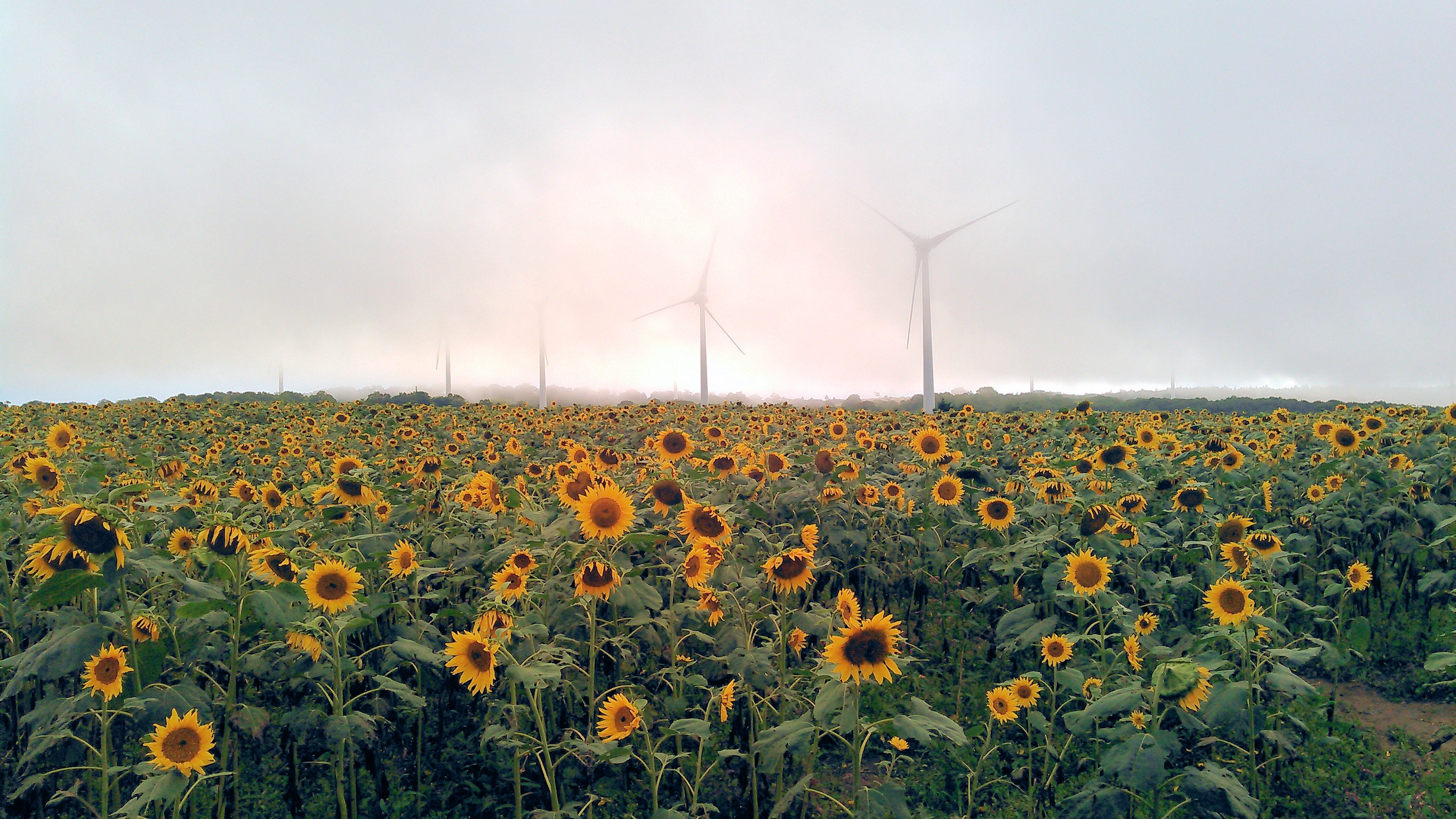 郡山市湖南町 布引高原の風車とひまわり